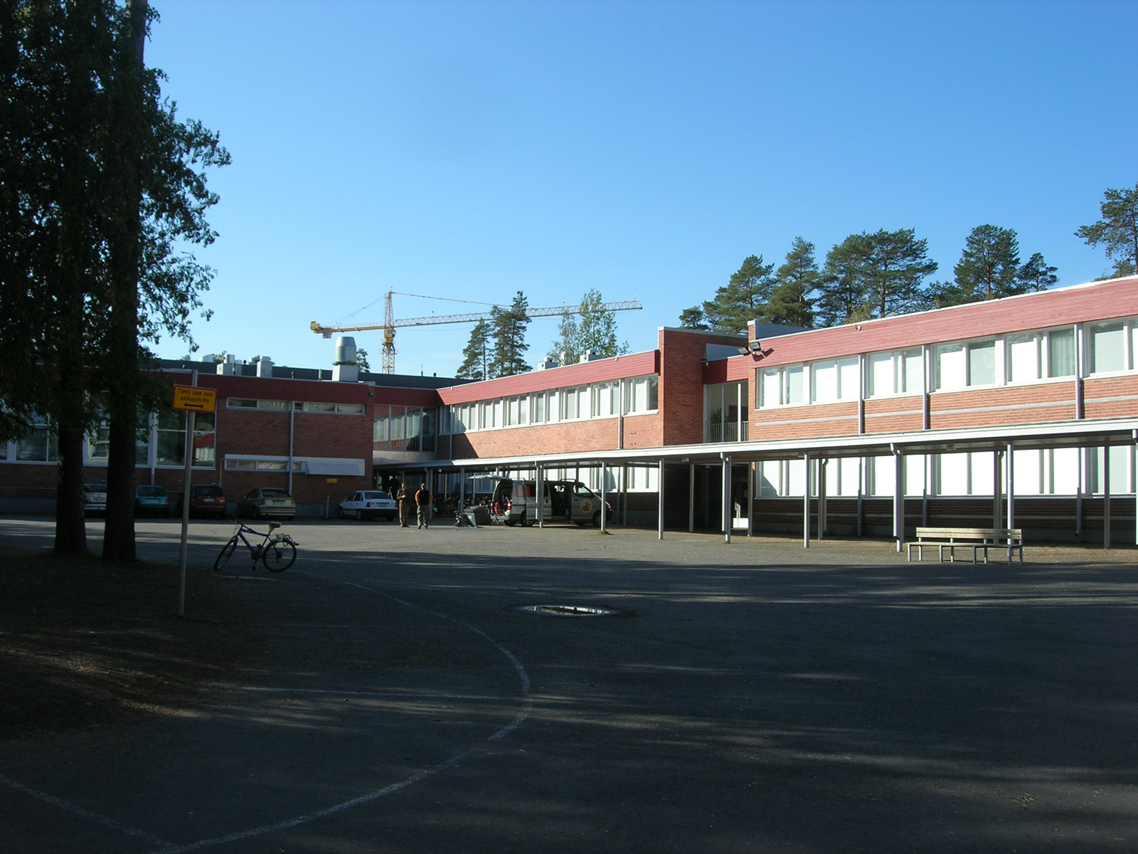 Kastellin lukion julkisivu syksyllä 2006.